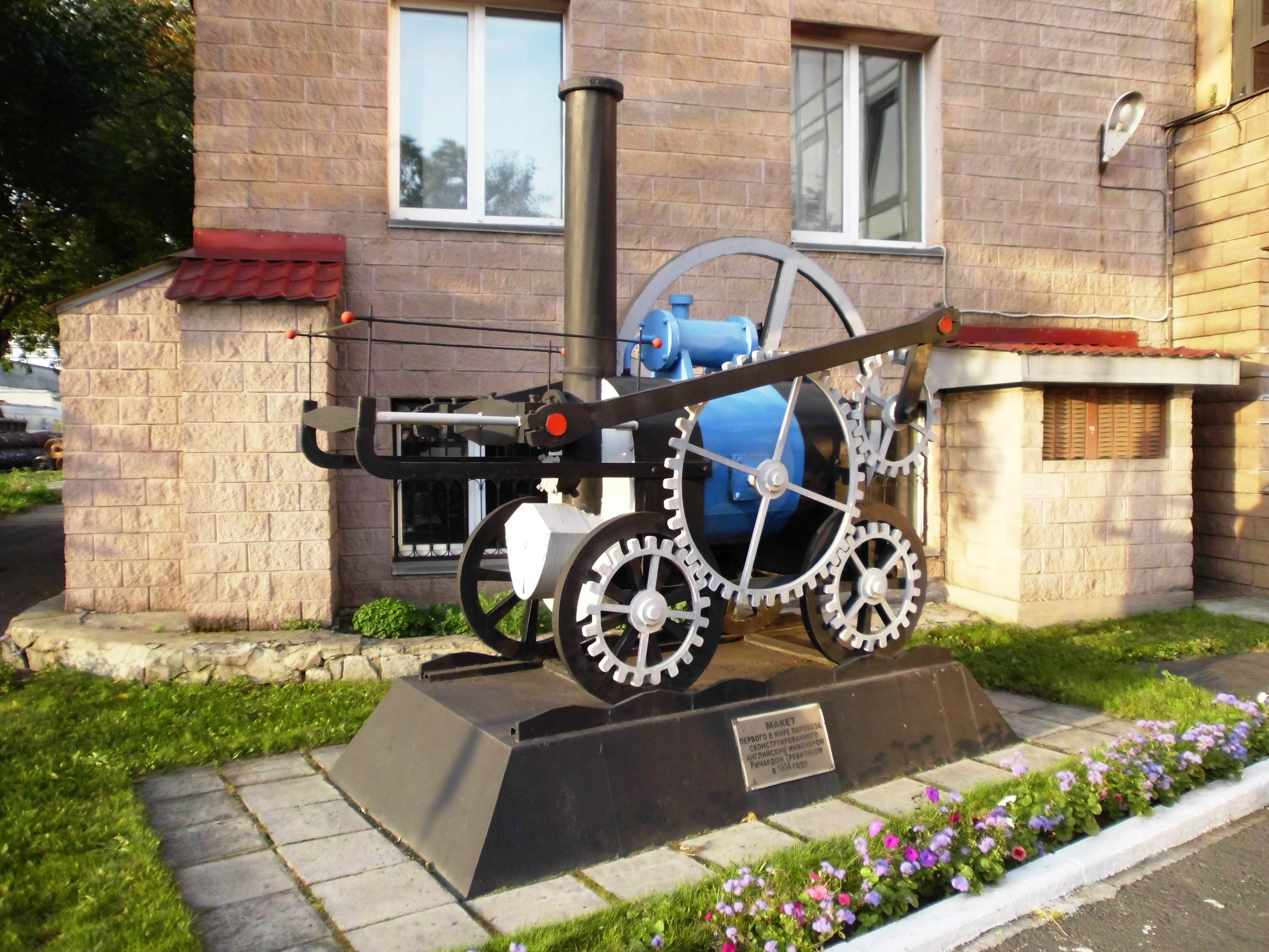 Макет первого рельсового паровоза в мире "Колбрукдэйл" сконструированного Ричардом Тревитиком. Находится на территории локомотивного депо железнодорожной станции Челябинск-Главный. Город Челябинск.